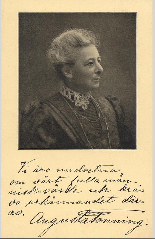 Rösträttkort som skall ha används av Augusta Tonning under hennes resor runt landet